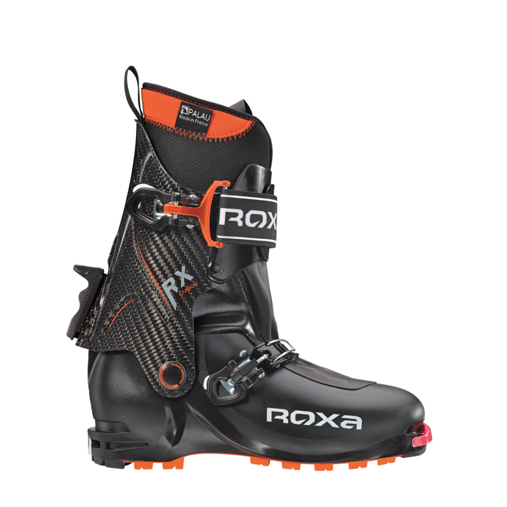 Lo scarpone ha una forma snella a 2 ganci, la parte inferiore è realizzata in plastica nera, mentre la parte superiore (gambaletto) è realizzata in carbonio.